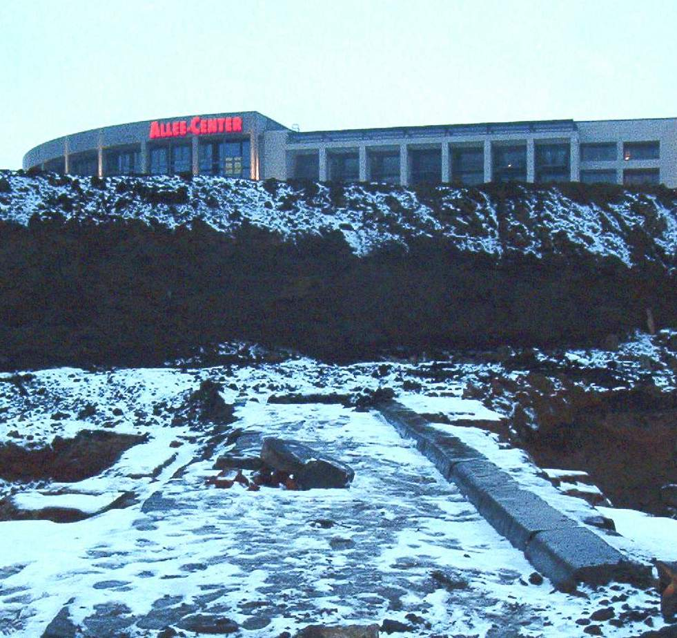 Pflasterung der alten Straße Weißgerbersteg in Magdeburg, Sachsen-Anhalt, Deutschland Bild aufgenommen am 30.1.2005 durch Olaf2